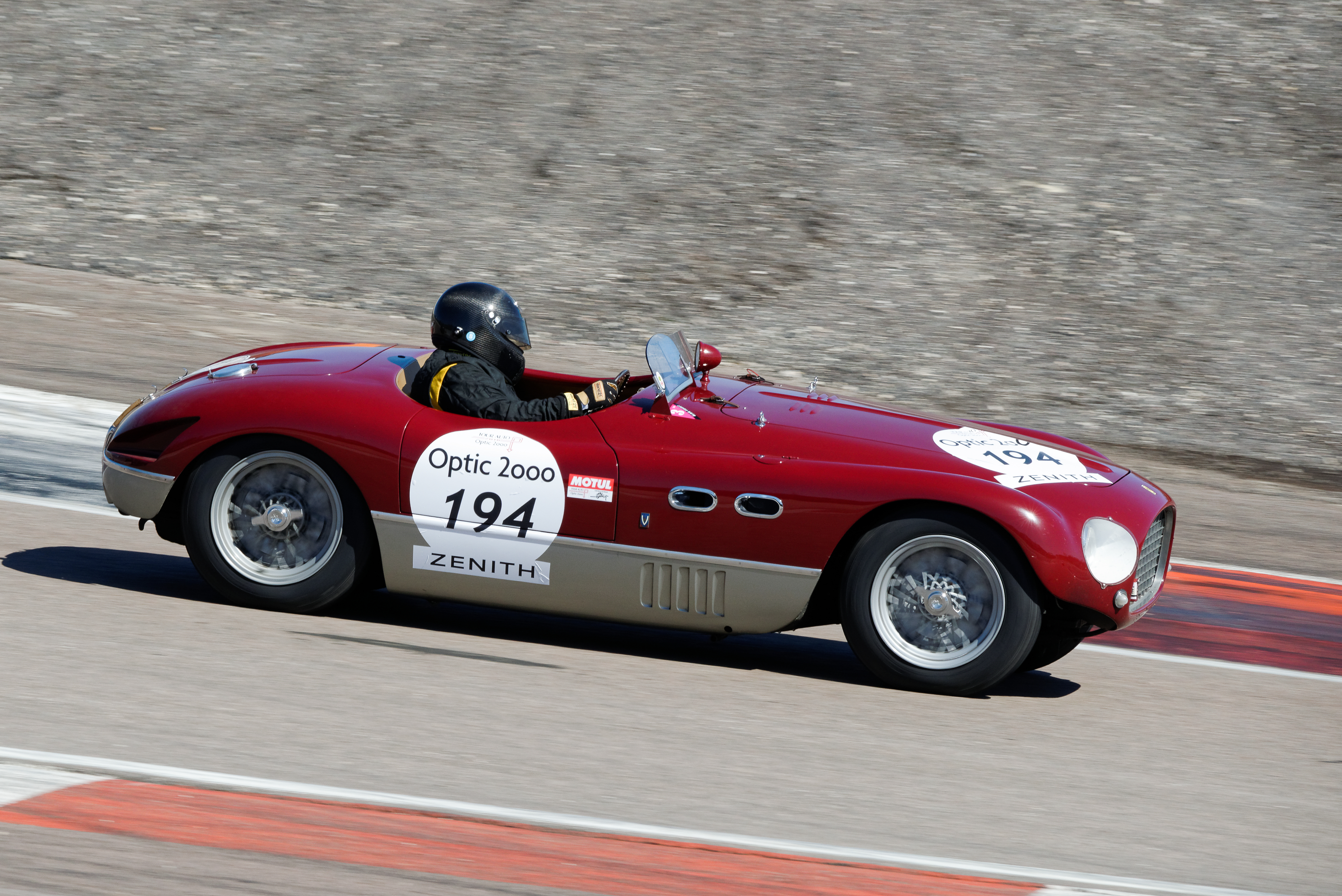 FERRARI 625 TF 1953 - Tour Auto Optic 2000, année 2016 - Étape sur le circuit de Dijon-Prenois (Côte d'Or, Bourgogne-Franche-Comté, France).